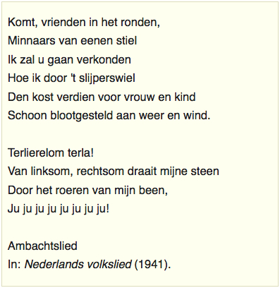 Tekst volksliedje 'Komt vrienden in het ronden' (stiel, slijperswiel, scharensliep) (oudste vindplaats: 1783). Opgenomen in het liedboek "Nederlands volkslied", samengesteld door Pollmann en Tiggers (1941).